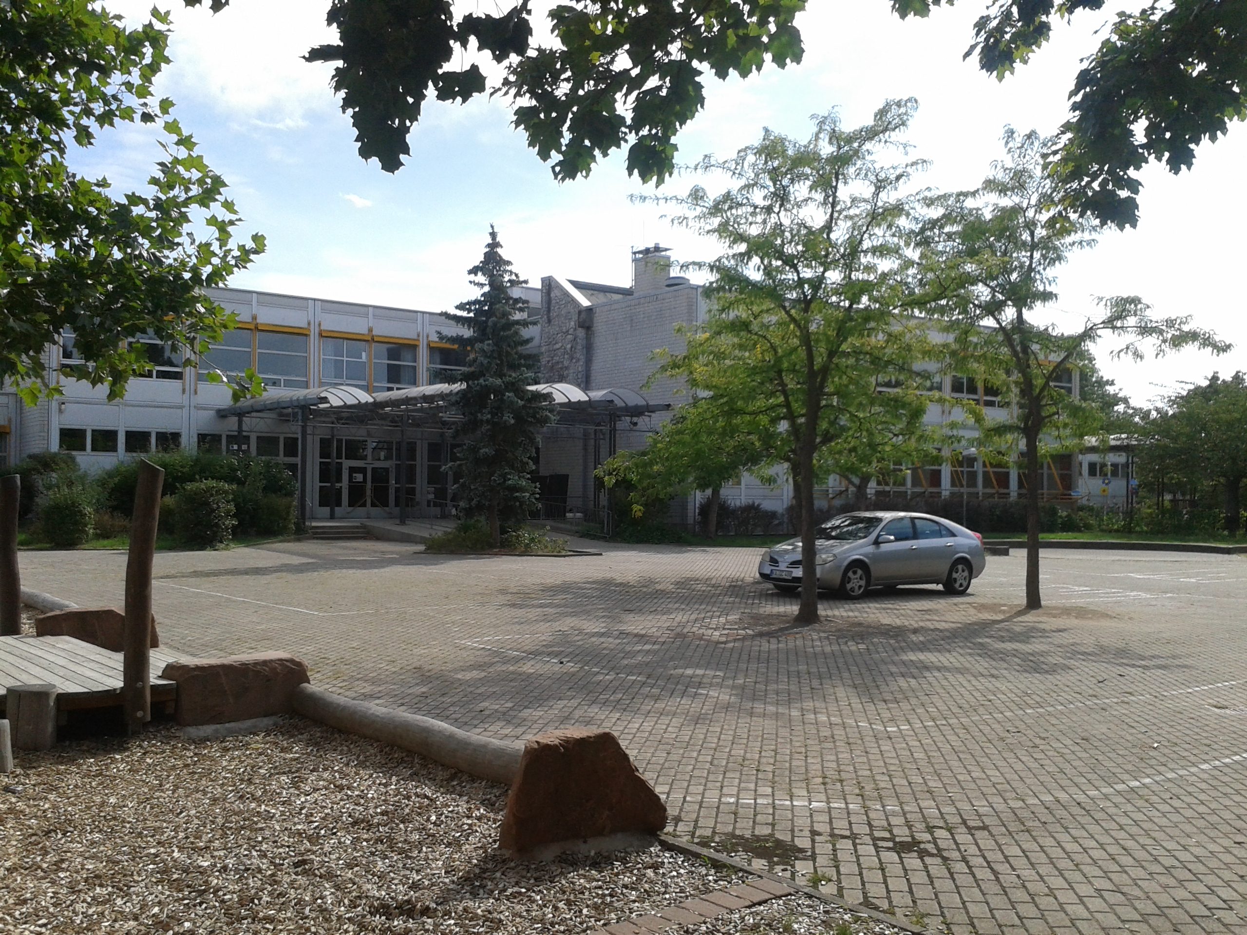 Friedrich-Magnus-Grund- und Hauptschule mit Werkrealschule in Stutensee-Friedrichtsal